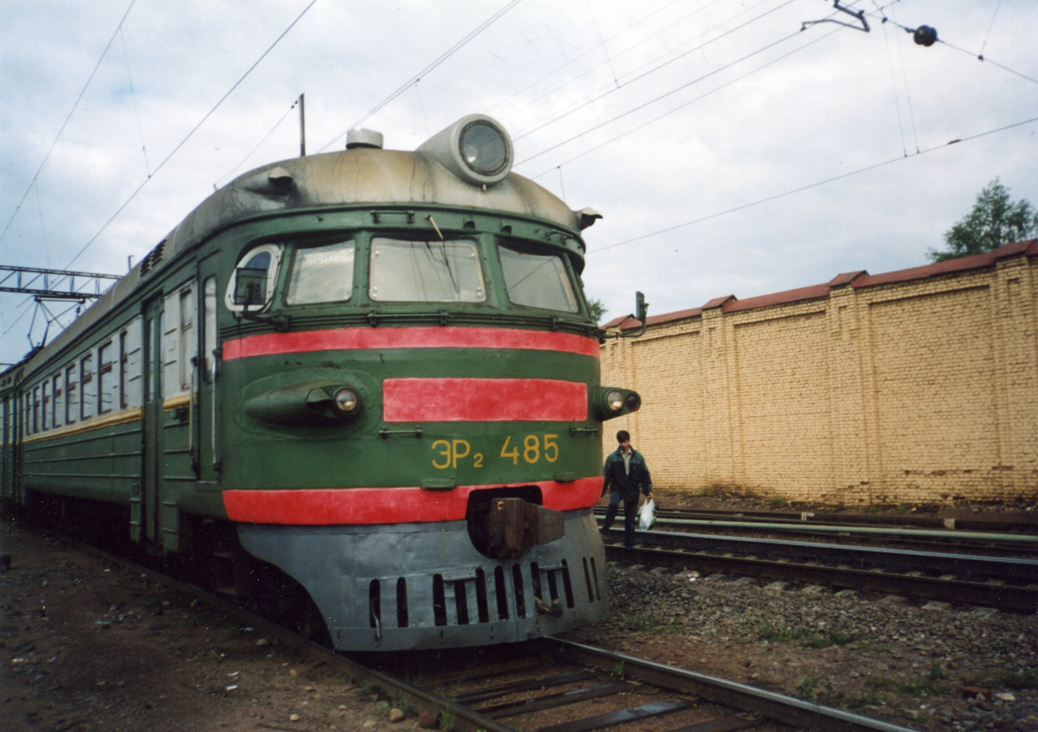 Электропоезд ЭР2-446 около Финляндского вокзала (Санкт-Петербург)